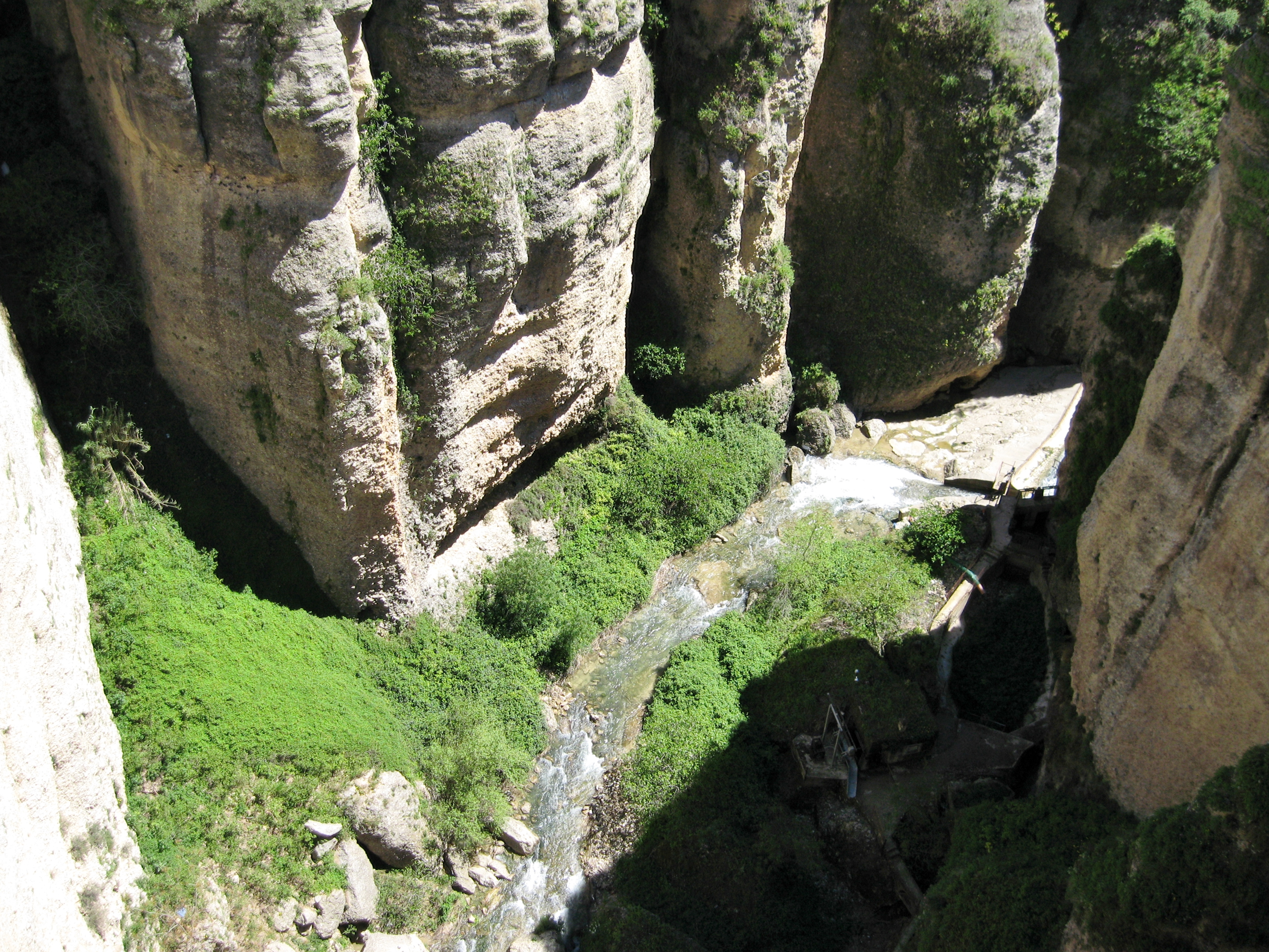 Der Fluss Río Guadalevín in Ronda, Sicht von der Neuen Brücke (Puente Nuevo), Provinz Málaga, Andalusien, Spanien